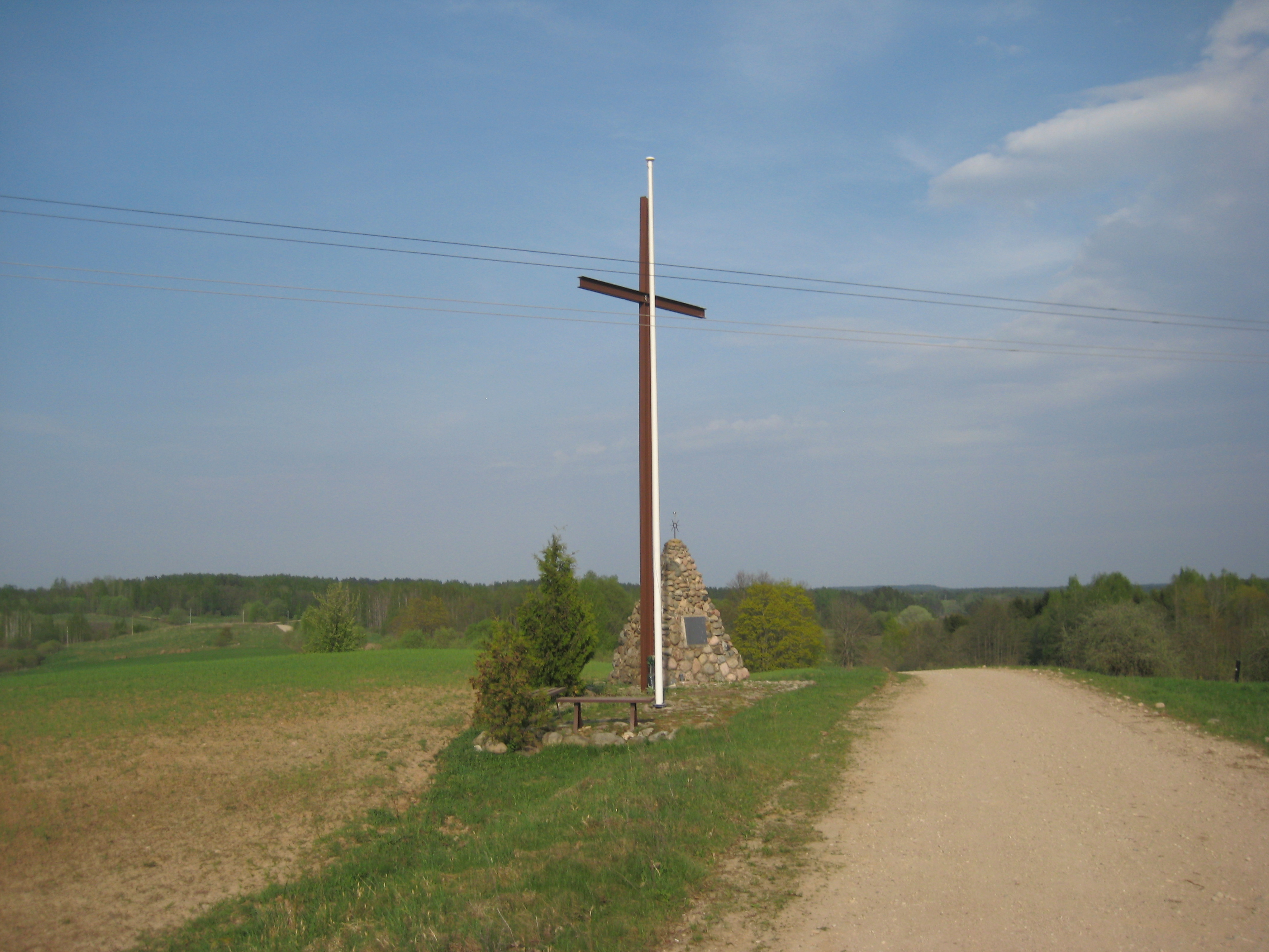 Degučių sen., Lithuania